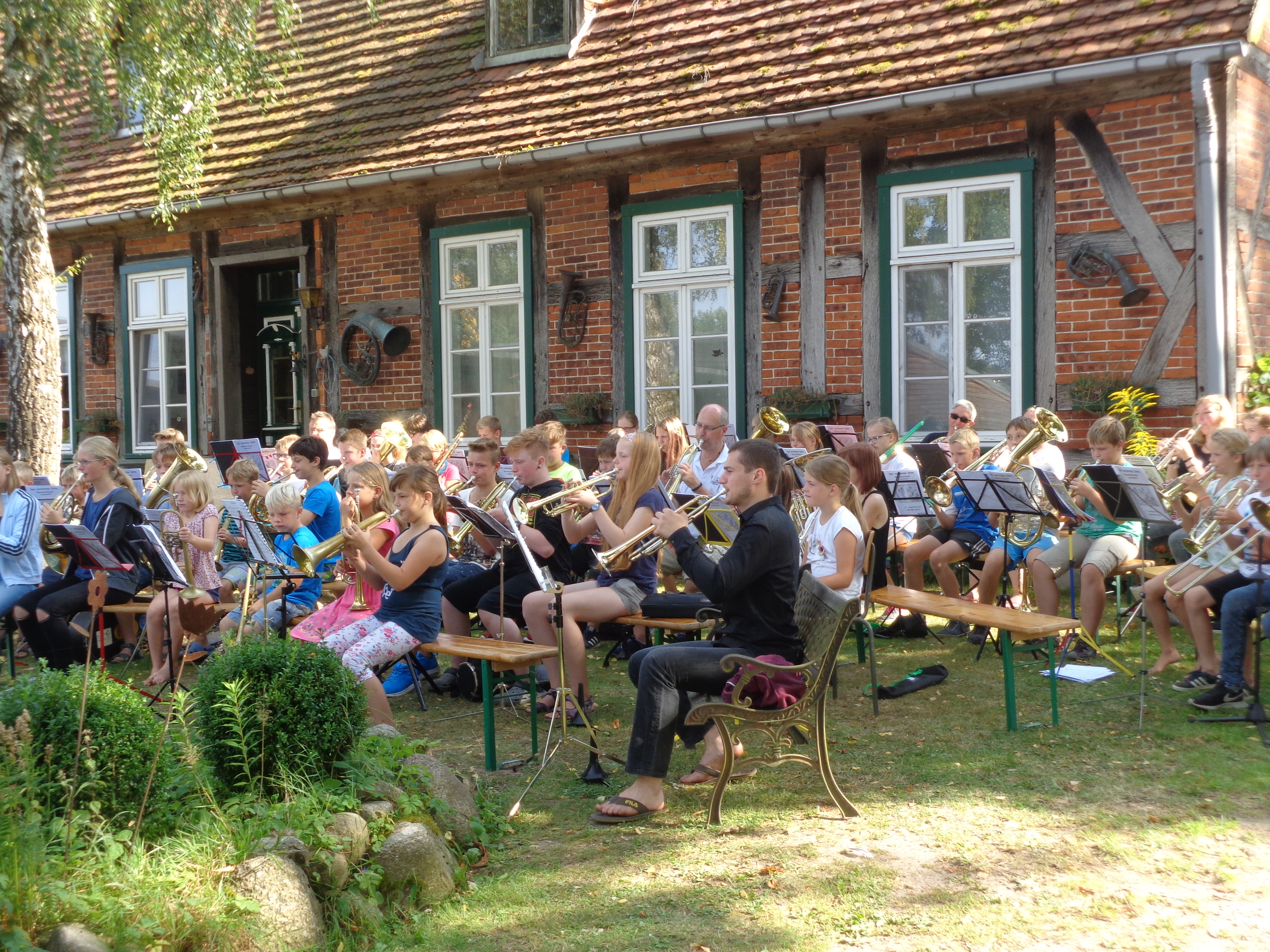 Jugendlicher Posaunenchor beim Gottesdienst mit dem Landesposaunenwart Mecklenburg-Vorpommern im Pfarrhof Barkow (Barkhagen)